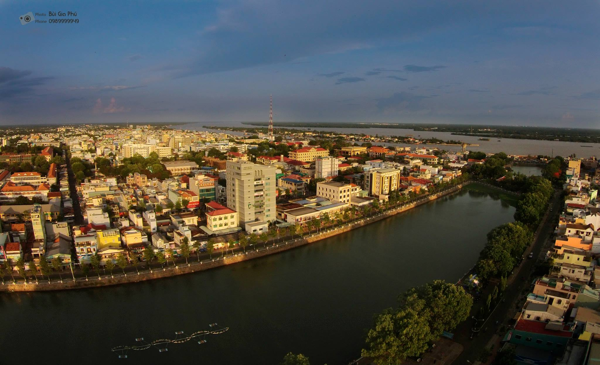 Ảnh Bùi Gia Nghĩa